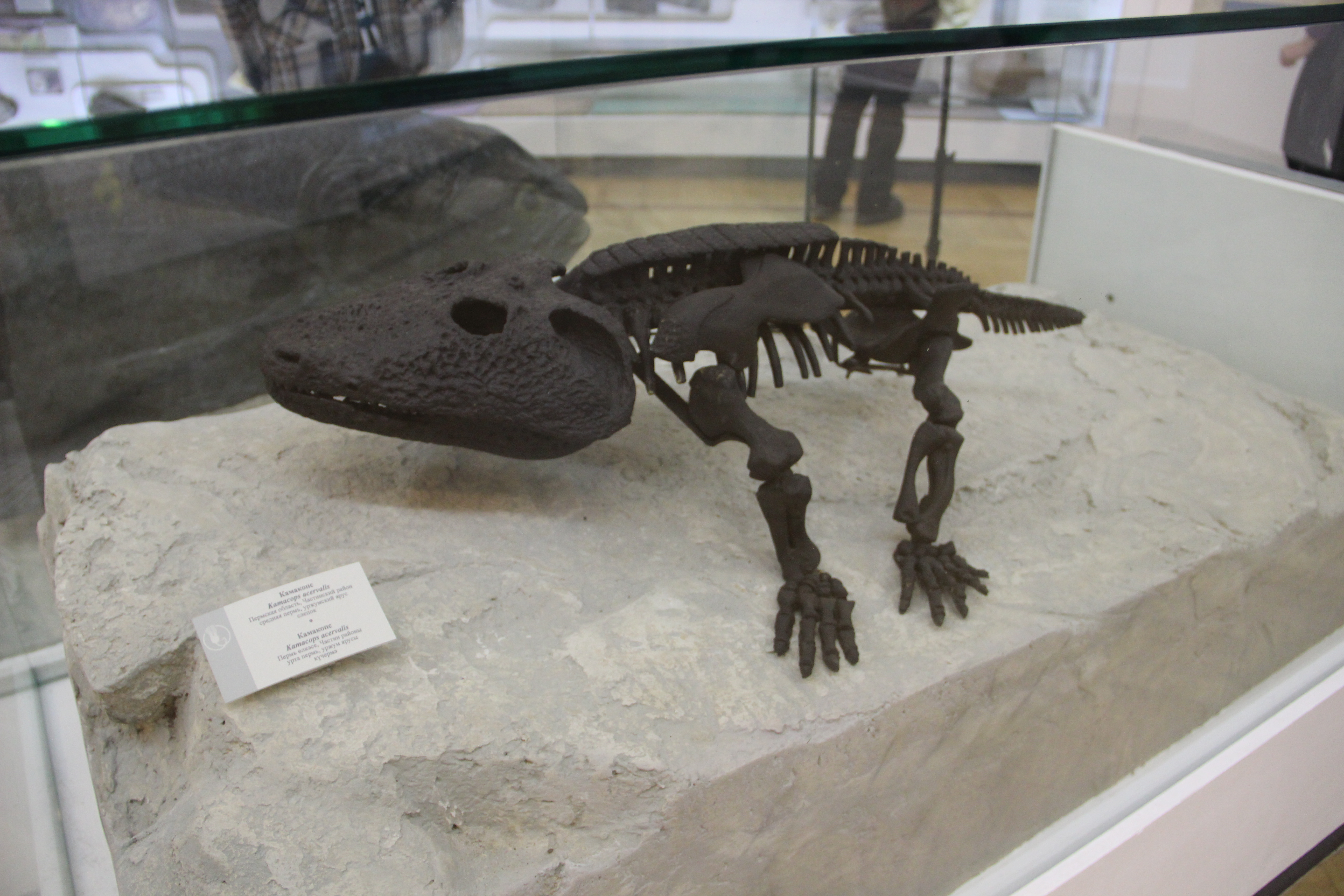 Короткомордый с Камы. Kamacops acervalis. Музей естественной истории РТ. Кремль. Казань. Январь 2014